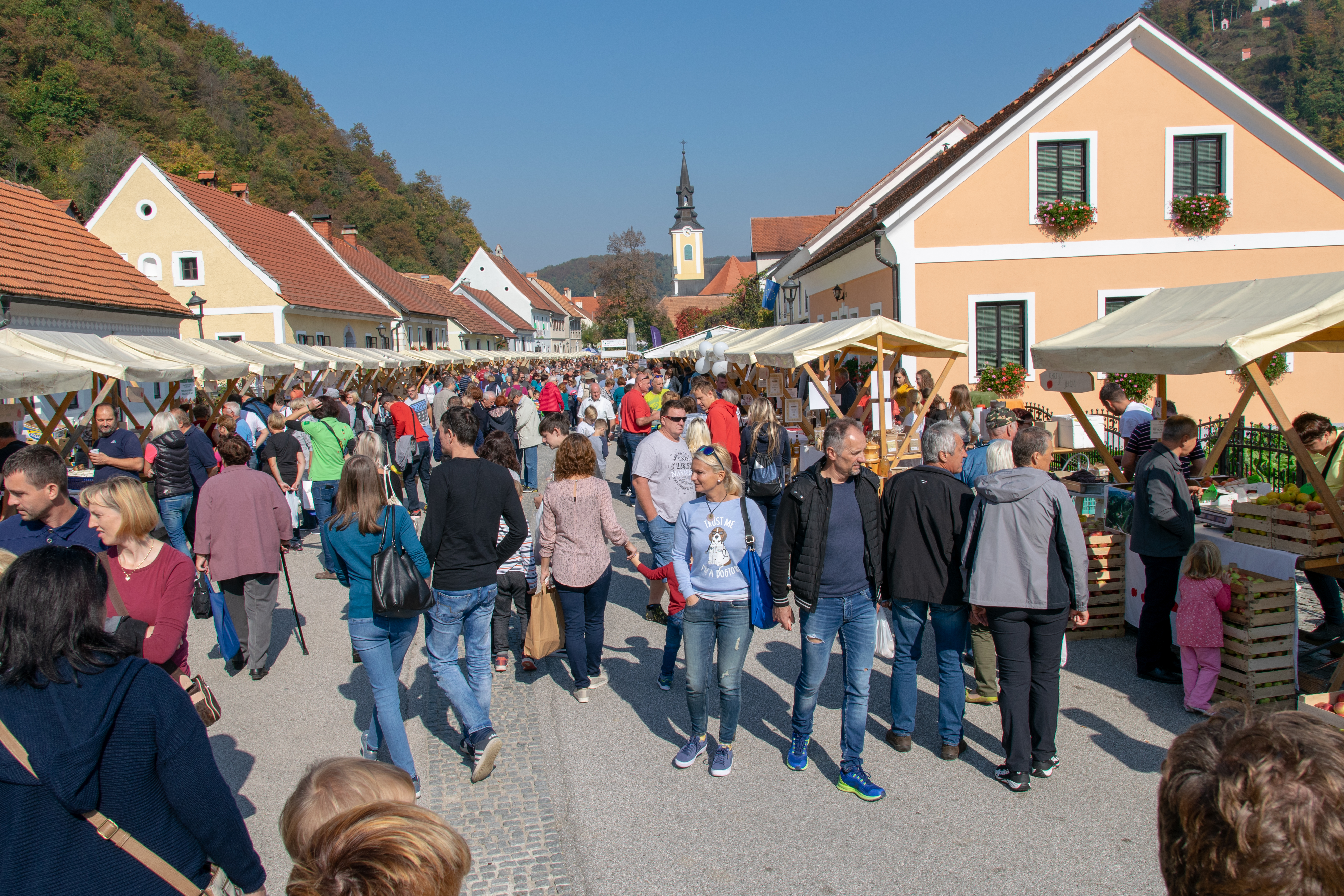 Kozjansko Apple Festival